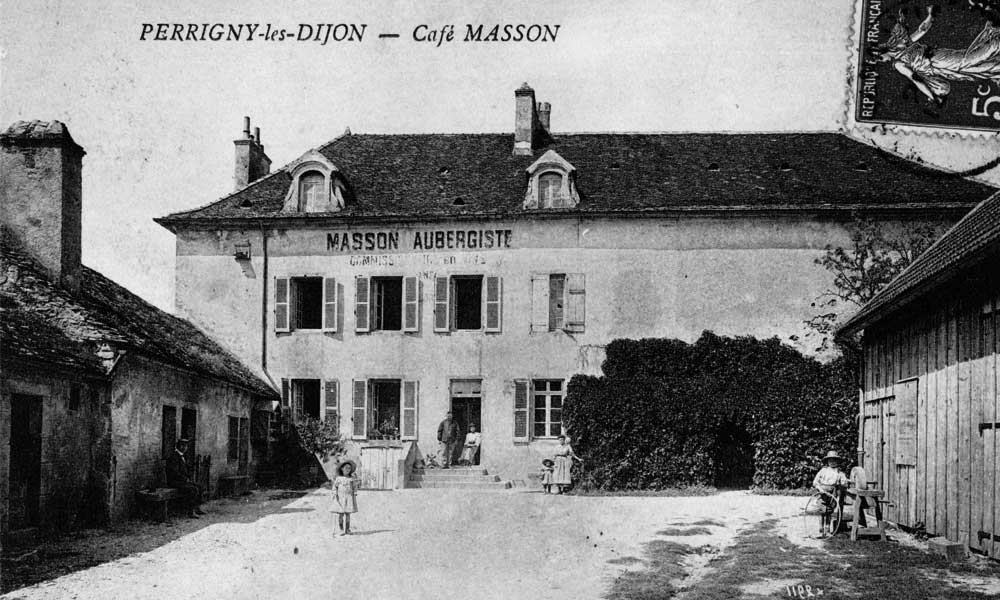 Auberge Masson